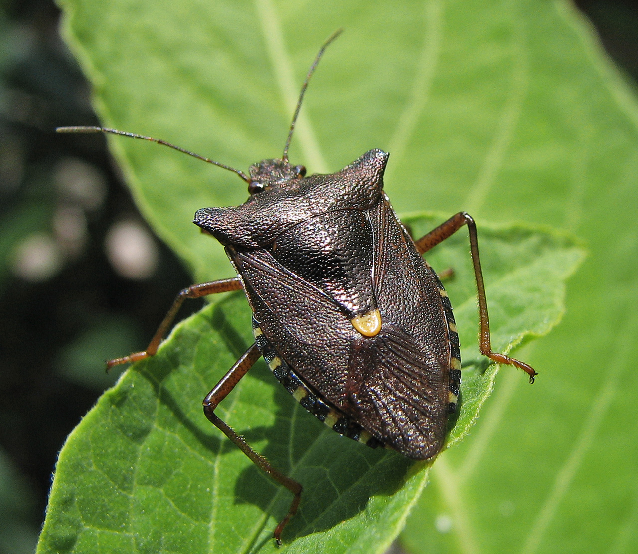 Beschreibung: Rotbeinige Baumwanze (Pentatoma_rufipes) Fotograf: Darkone, 5. August 2005